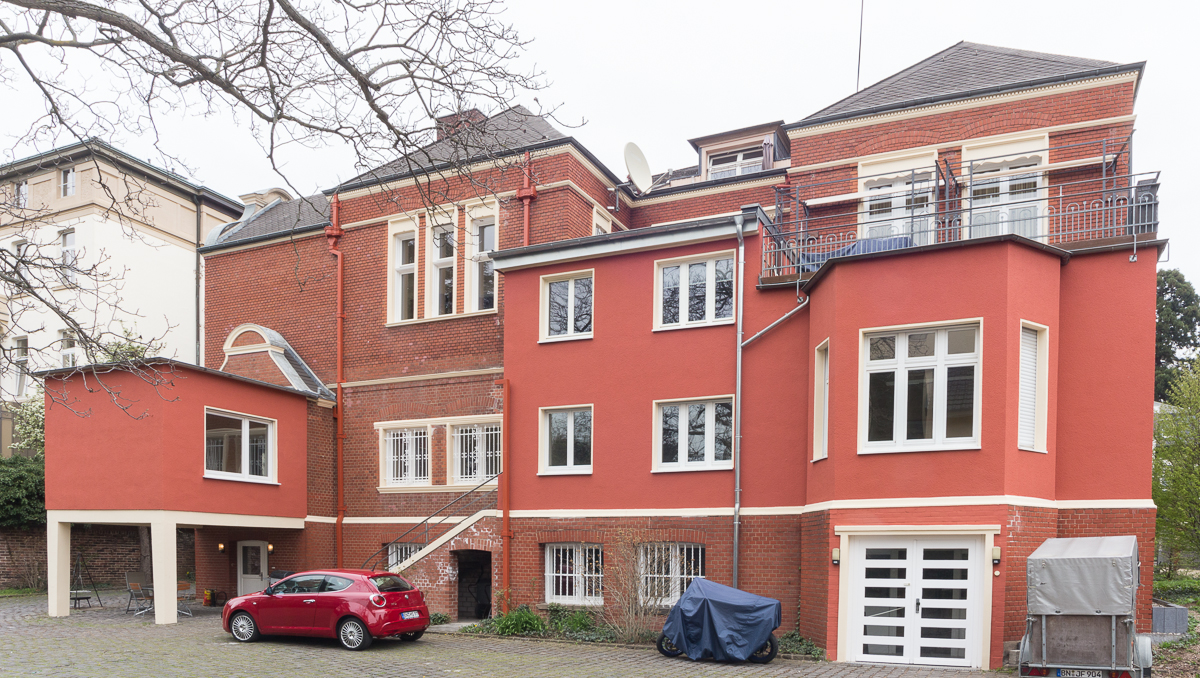 Villa, Adenauerallee 124, Bonn: Rückfassade